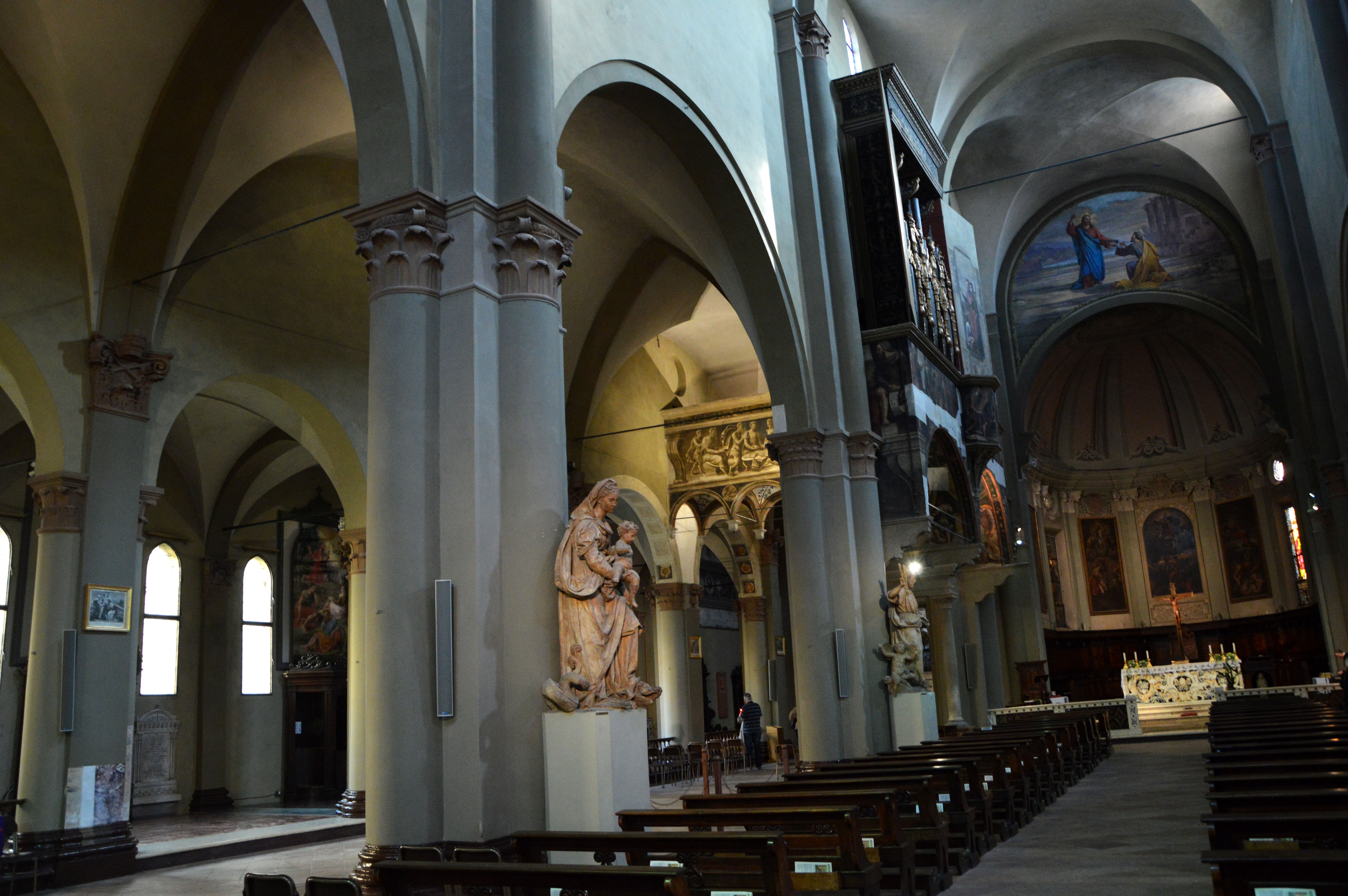 Chiesa e monastero di San Pietro This is a photo of a monument which is part of cultural heritage of Italy.